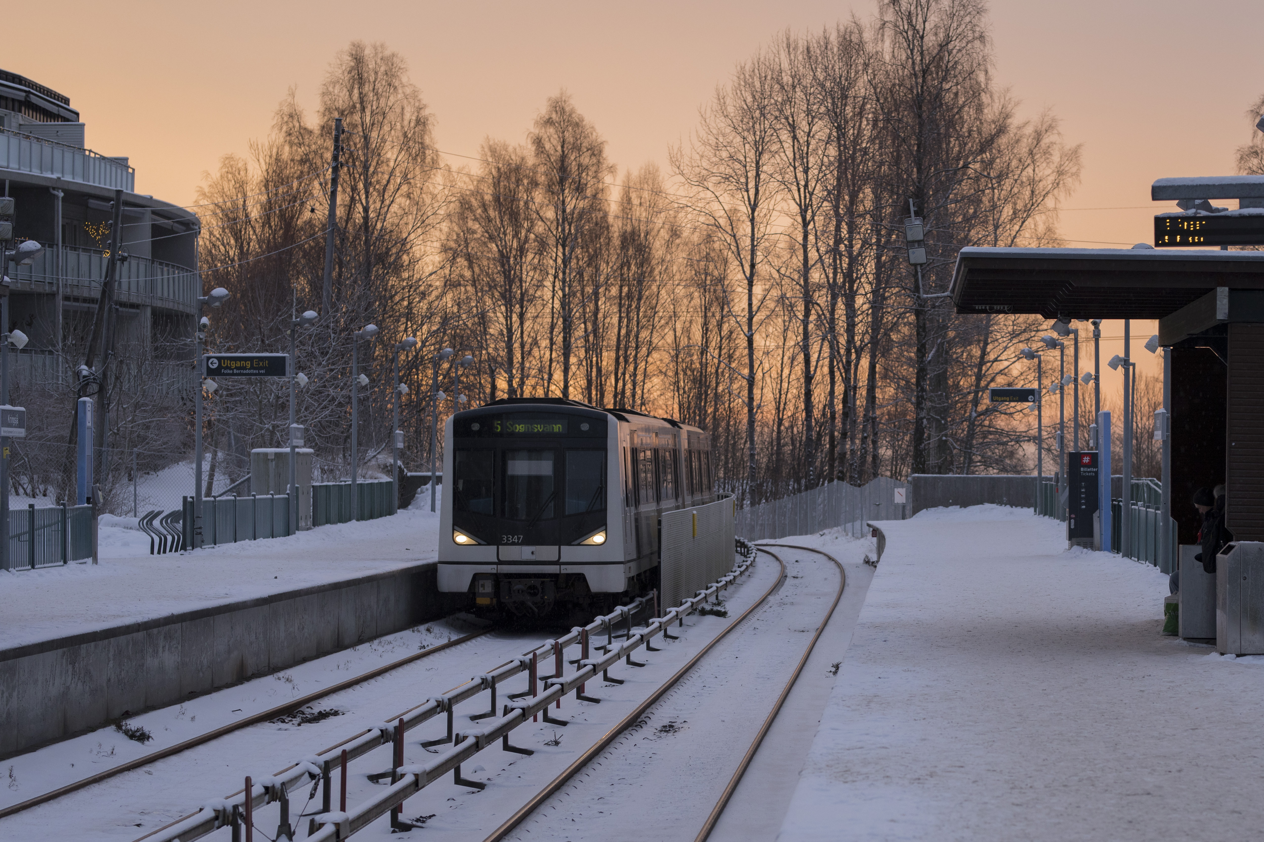 Kringsjå stasjon